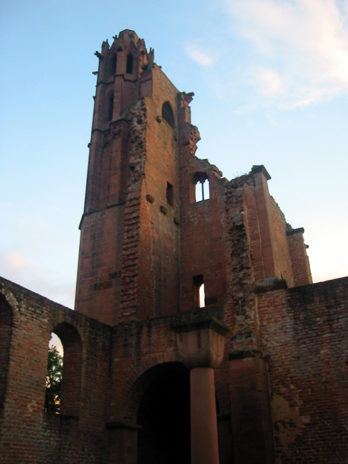 Blick auf den Turm der Klosterruine Limburg